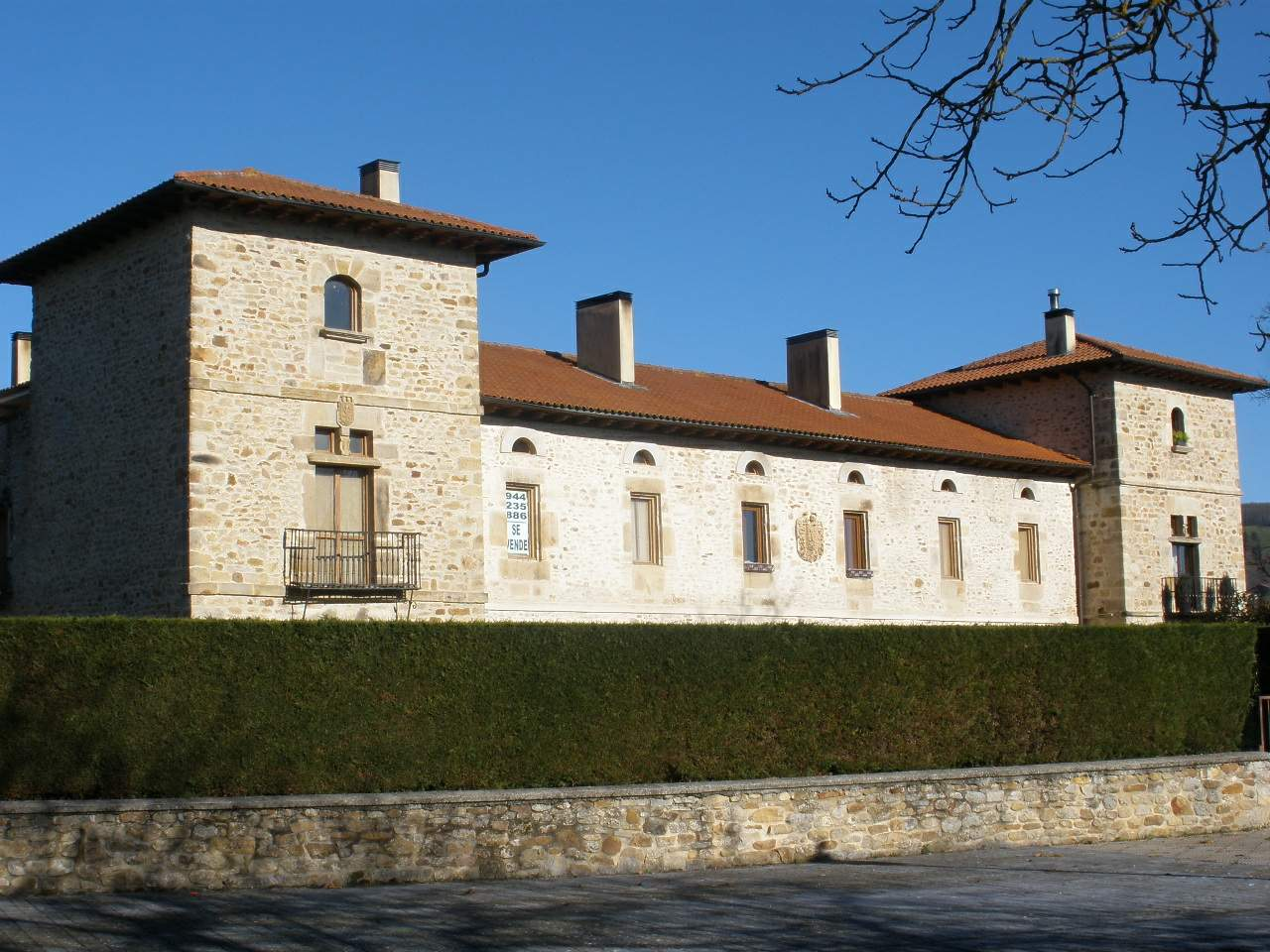 Palacio de Iturrate, en Sarría (Zuia, Álava)